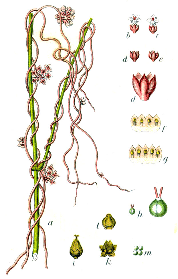 Cuscuta europaea L. Original Description Nessel-Seide, Cuscuta europaea